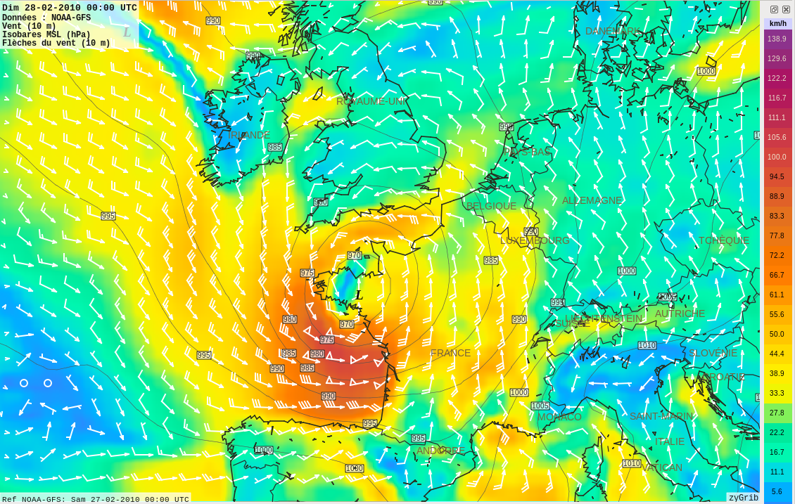 Visualiation de fichier NOAA-GFS dans zygrib de la tempête Xynthia le 28 février 2010 à 0h